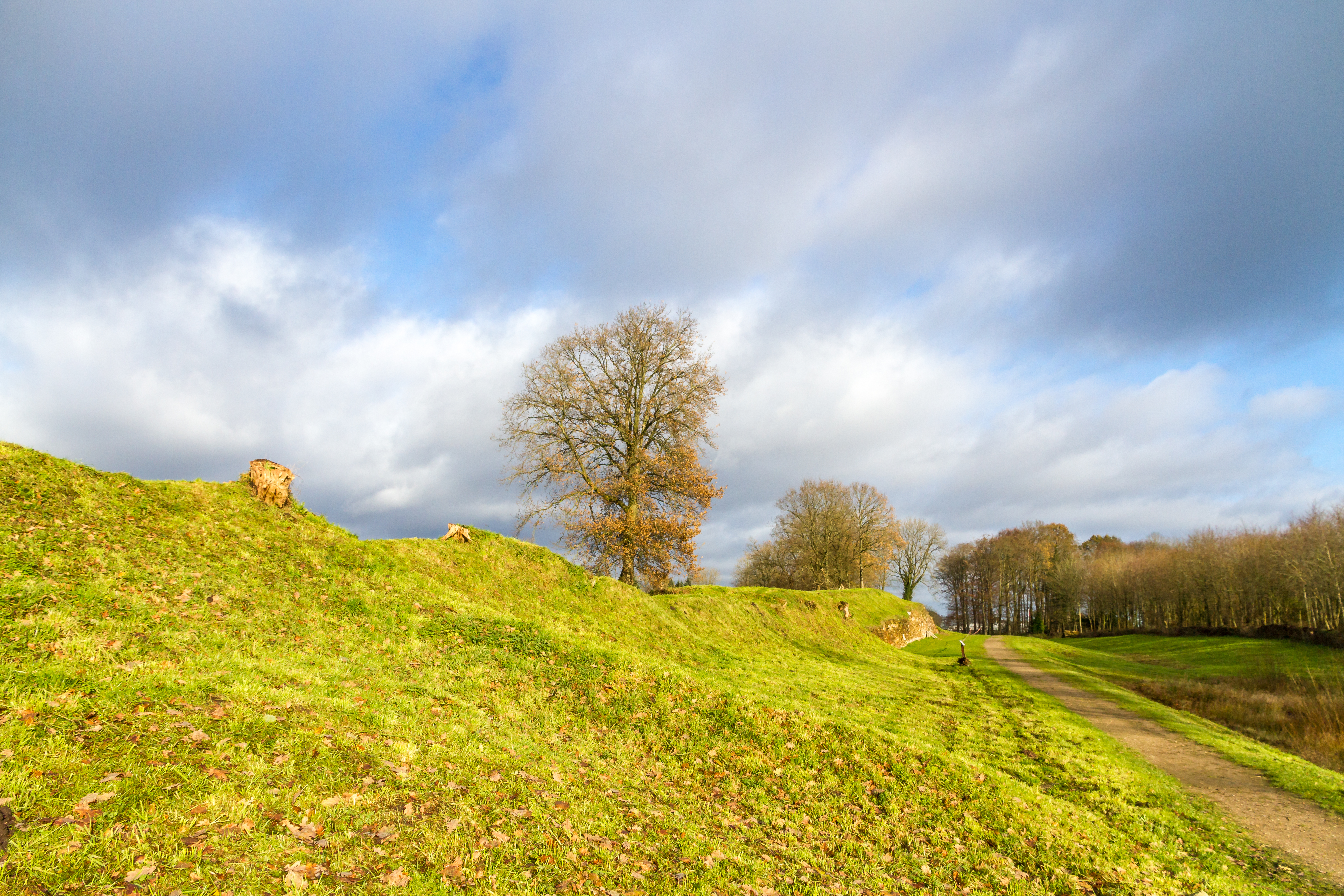 Das Danewerk in Dannewerk